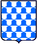 Dit is nl::Image:Field_vair.png van maar ik heb de kleuren verwisseld. Ik weet niet hoe het in de Engelse heraldiek is, maar volgens mij moeten in de Nederlandse heraldiek de blauwe "klokjes" rechtopstaan, anders is het omgekeerd vair.